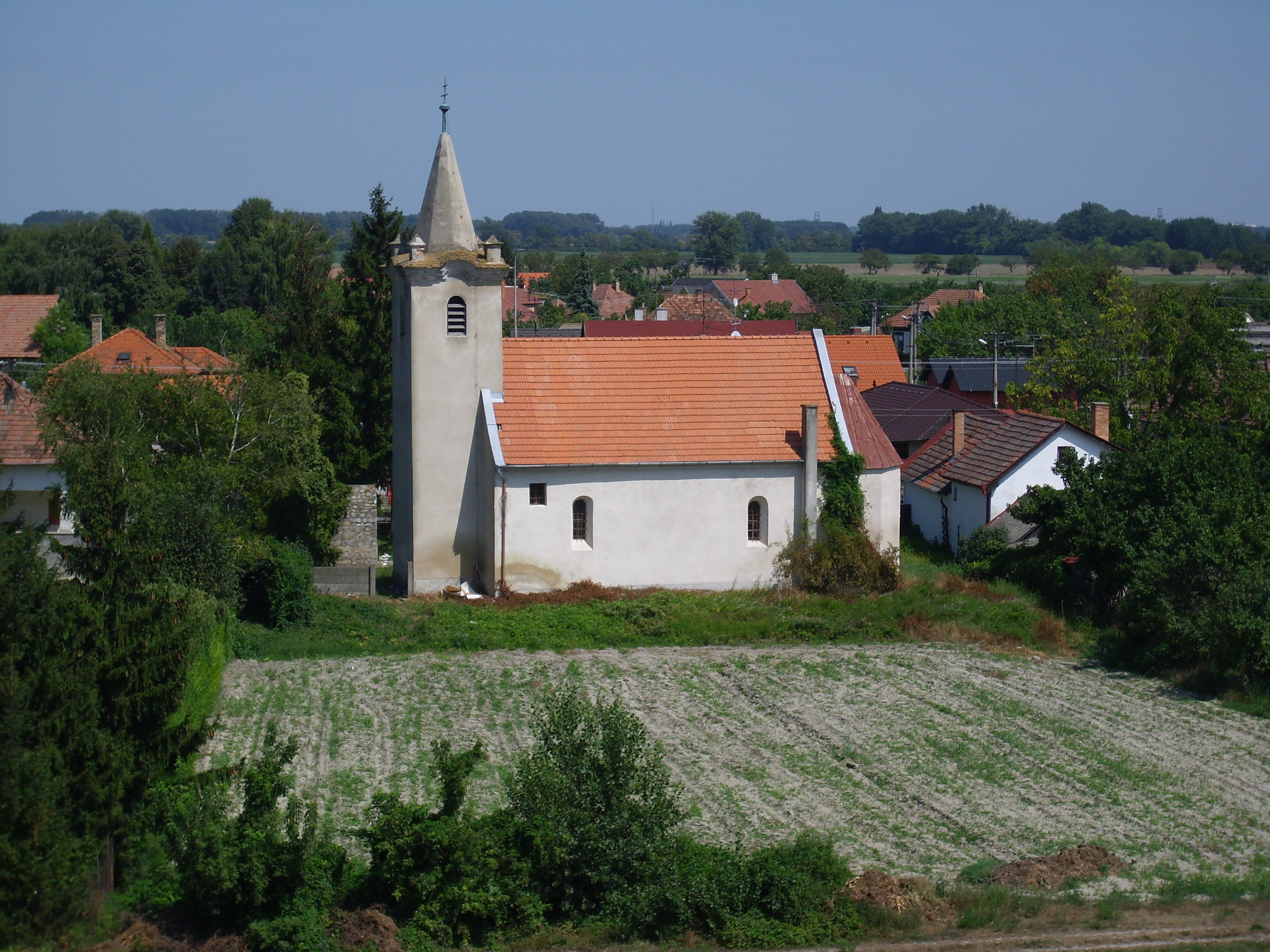 Süly katolikus temploma